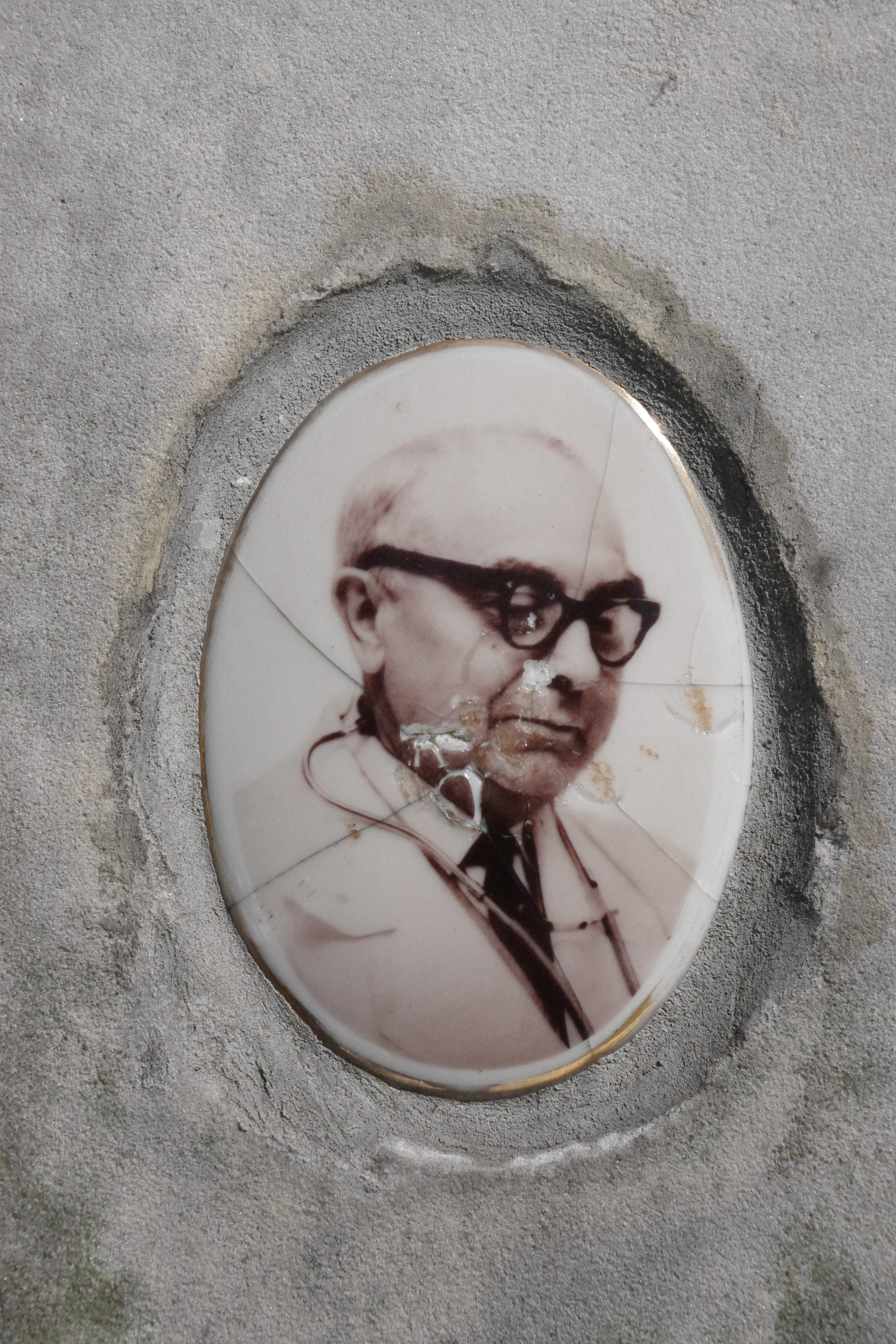 Grób lekarza Władysława Kosińskiego - ordynatora Szpitala Praskiego w Warszawie, w grobowcu rodzinnym na warszawskim Cmentarzu Powązkowskim